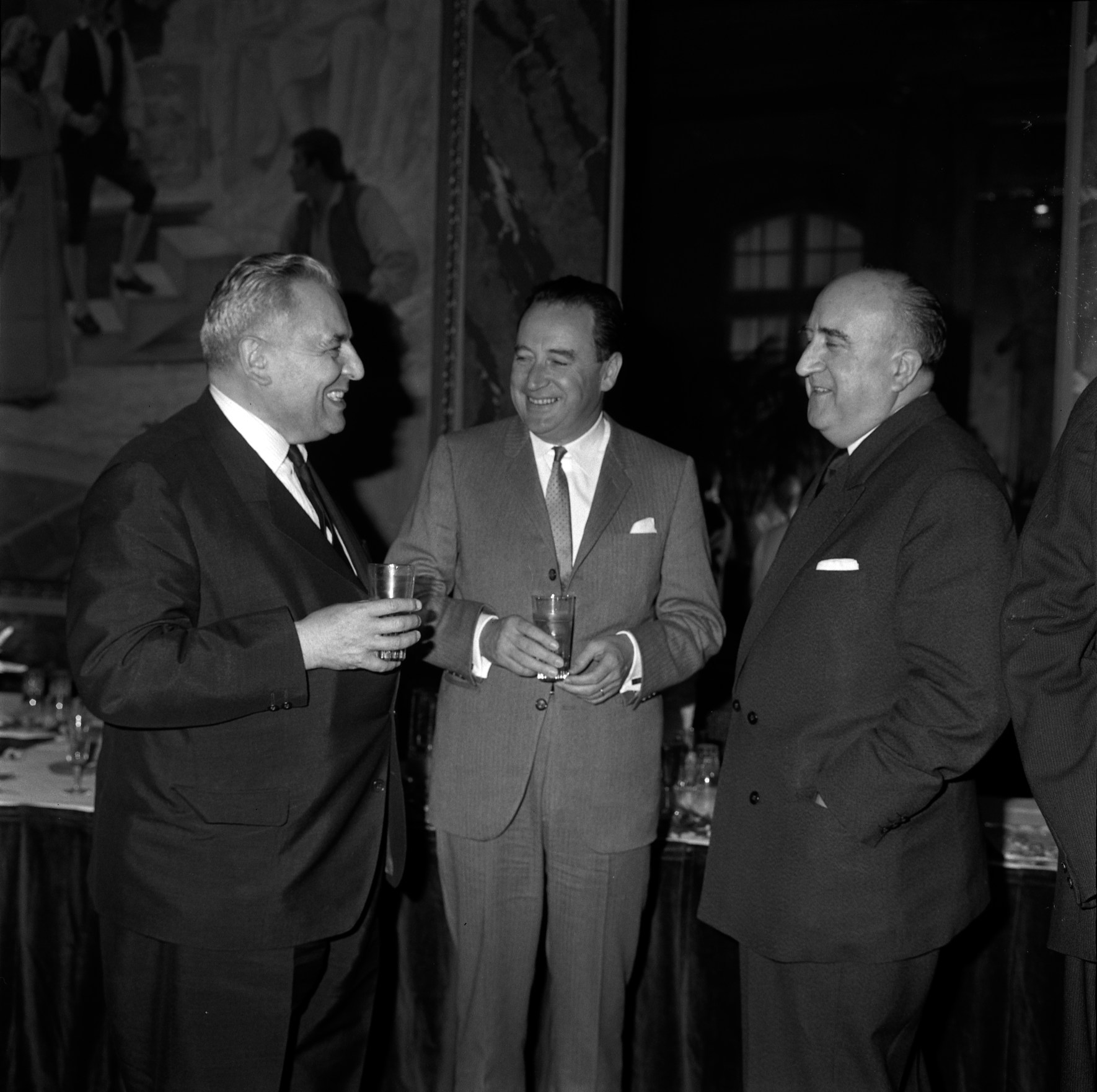 Salle du Capitole. Le 3 Mai 1965. Vue de Maurice Faure, Louis Bazerque et de Monsieur Sicre dans la salle du Capitole.